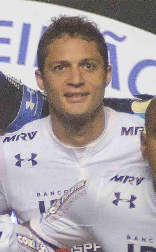 Partida valida pela quarta rodada do campeonato brasileiro 2018